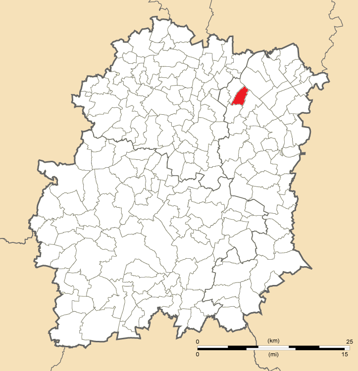 Carte de position de Grigny en Essonne